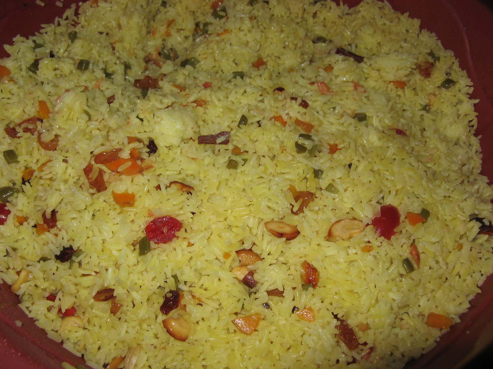 Ready biriyaani